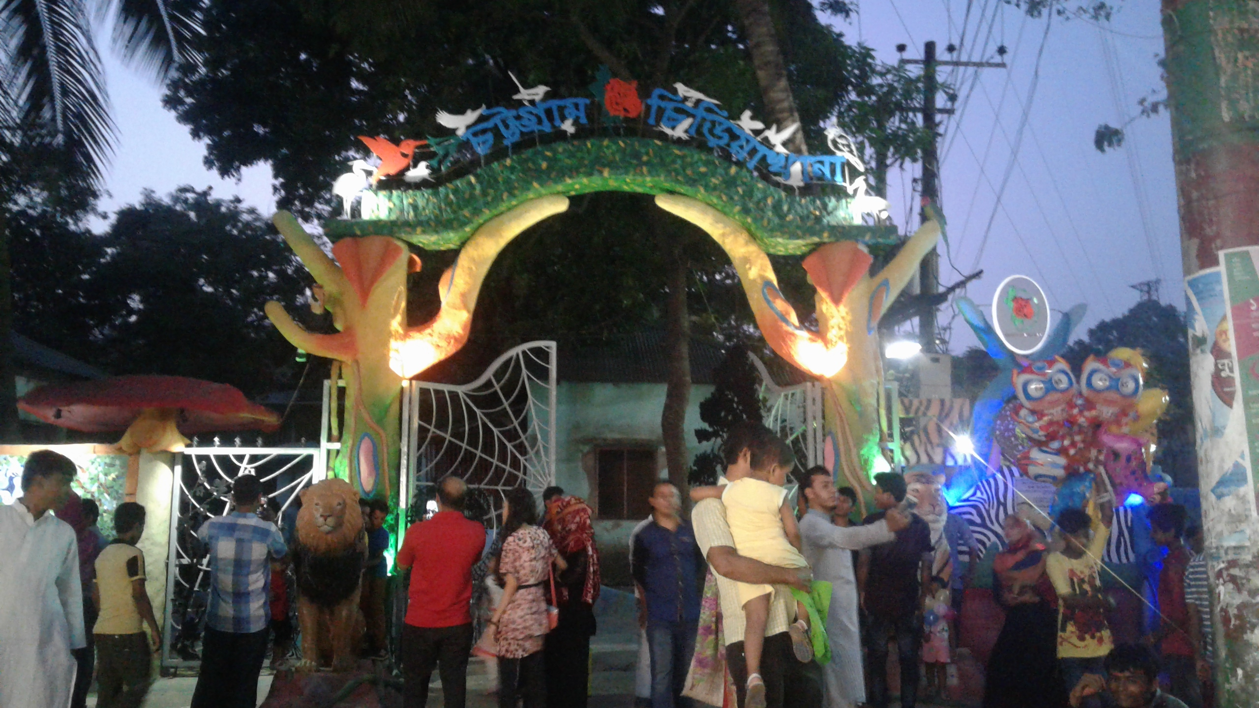 চট্টগ্রাম চিড়িয়াখানা